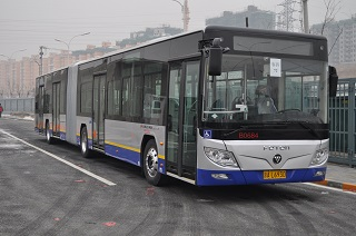 中文（中国大陆）: 快速公交四号线整车外观